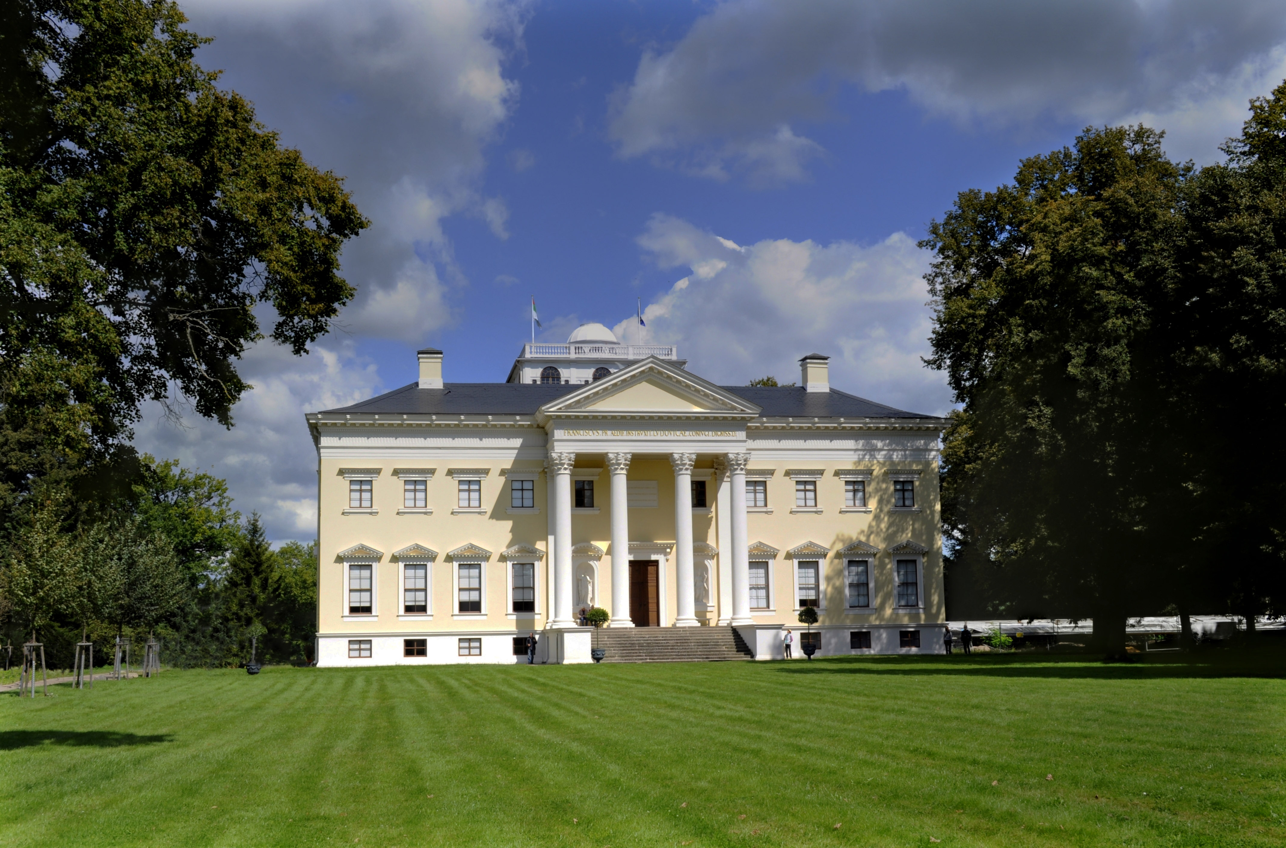 Schlossfassade Wörlitz